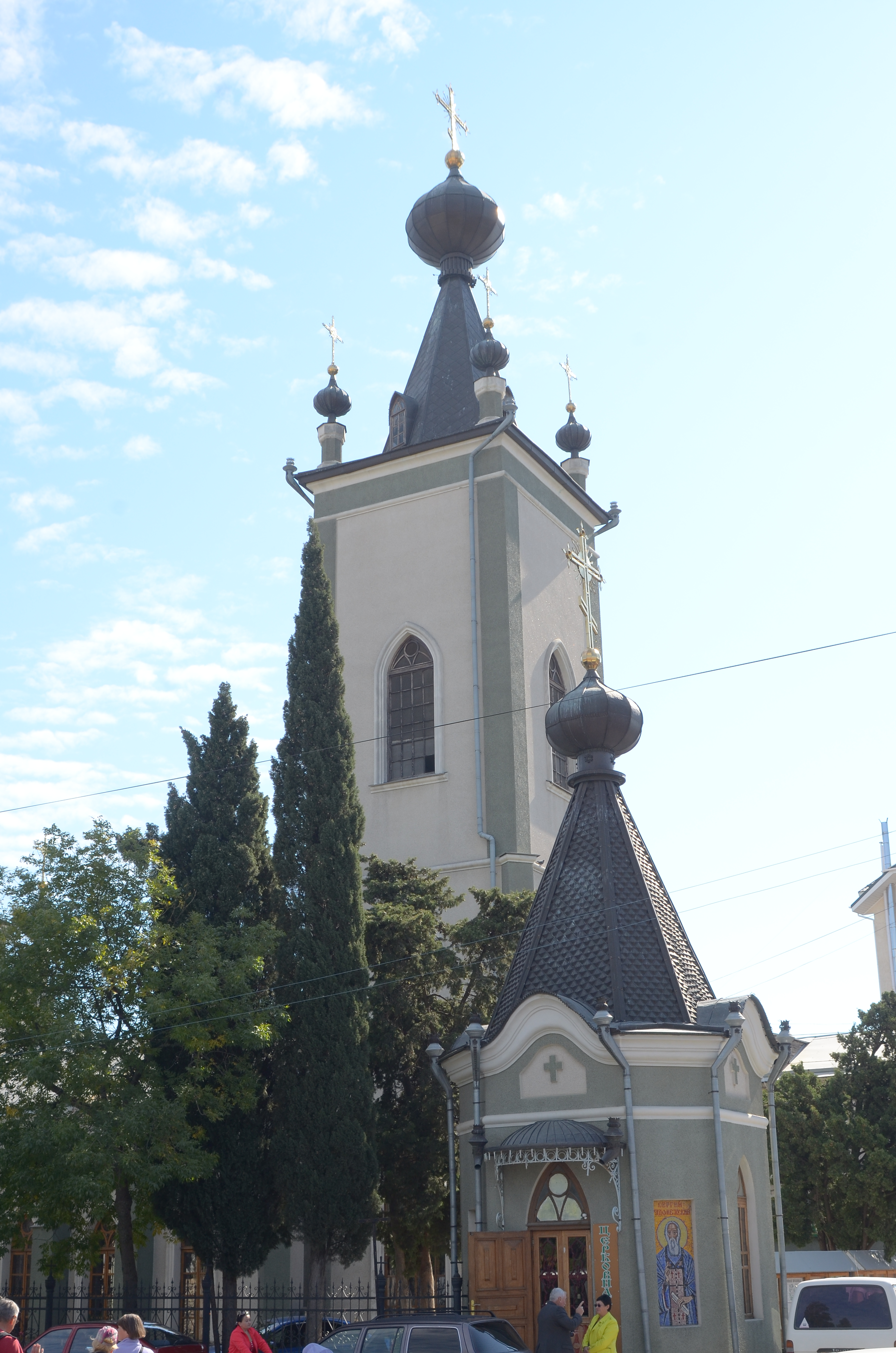 Алушта